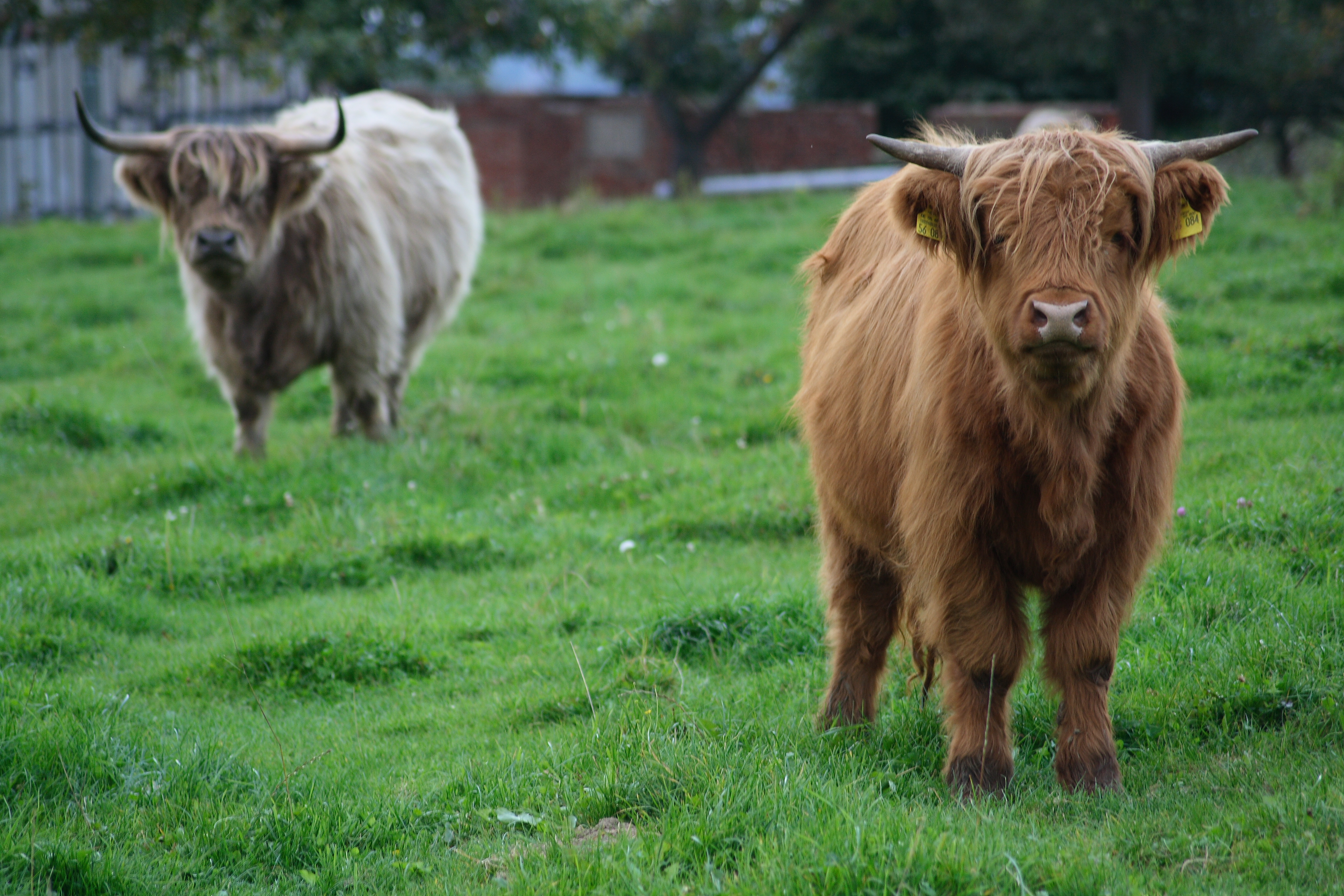 Highland cattle in Germany